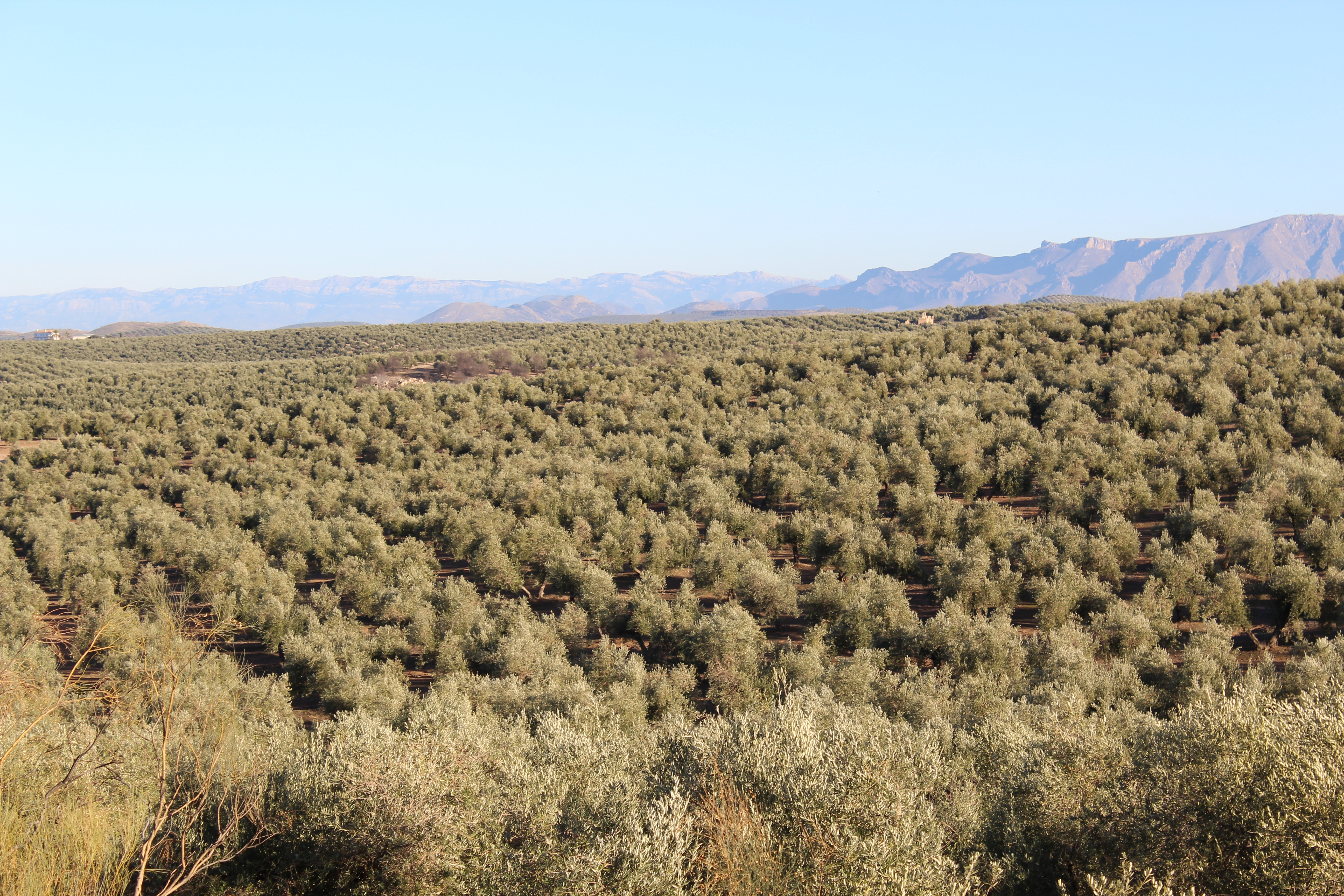 Sierra de Cazorla y Serrezuela de Bedmar desde la campiña olivarera giennense.